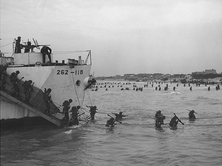 Débarquement, Juno Beach. Crédit: Canadian Forces Joint Imagery Centre : "Canadian Soldiers Disembark at Juno Beach. Source: Library and Archives Canada"